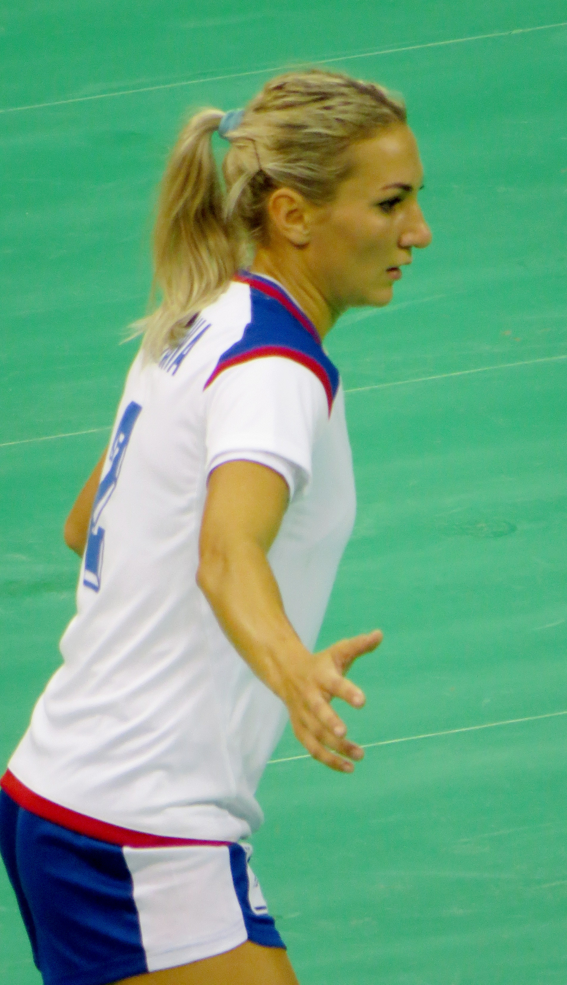 Polina Kuznetsova, Rio 2016